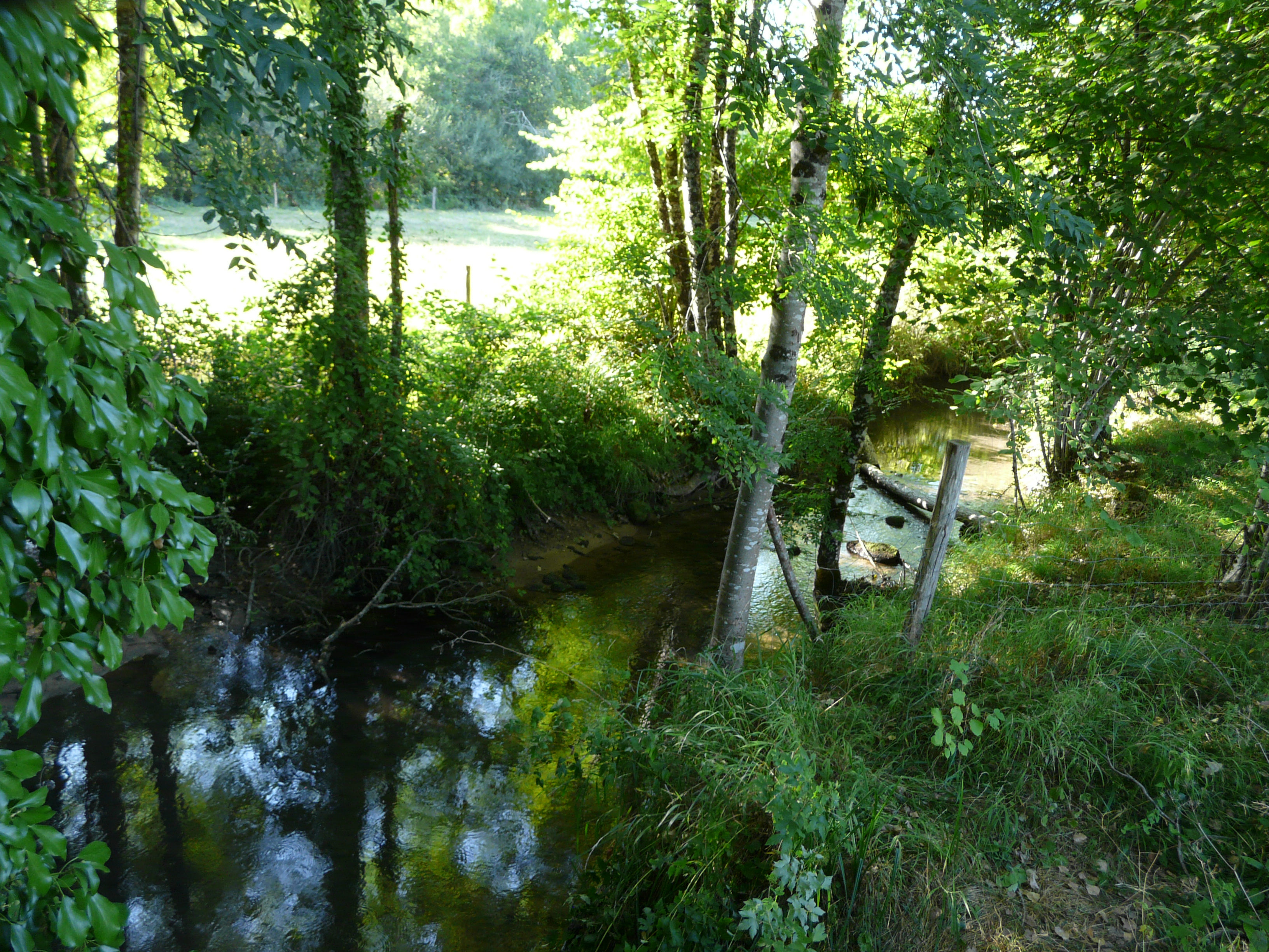 Le Vimont au lieu-dit le Peuch, Fleurac, Dordogne, France. Vue prise en direction de l'amont.